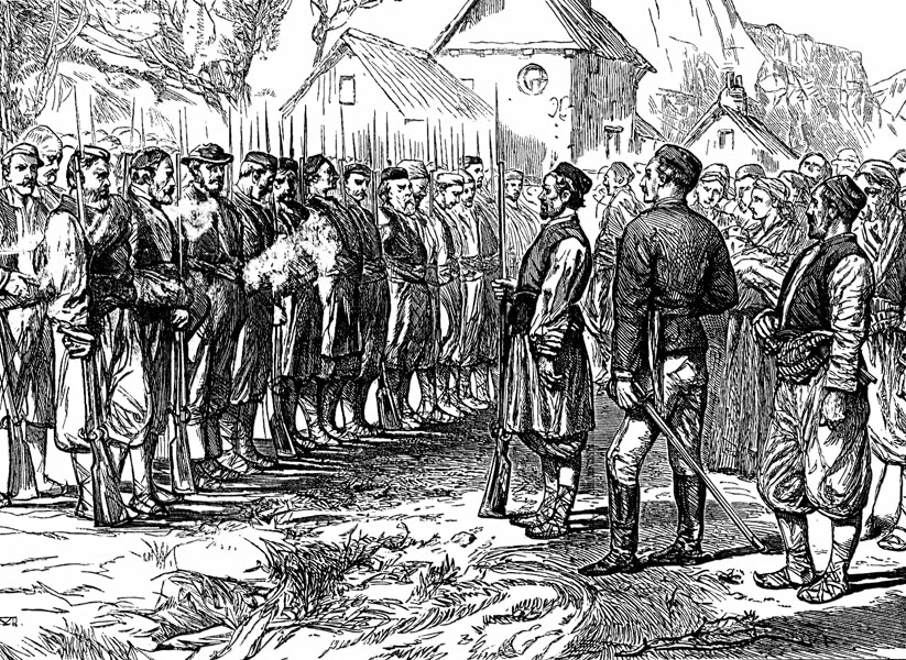 Рат: прозивка добровољаца у Ивањици. новинска ксилографија. око 1875.